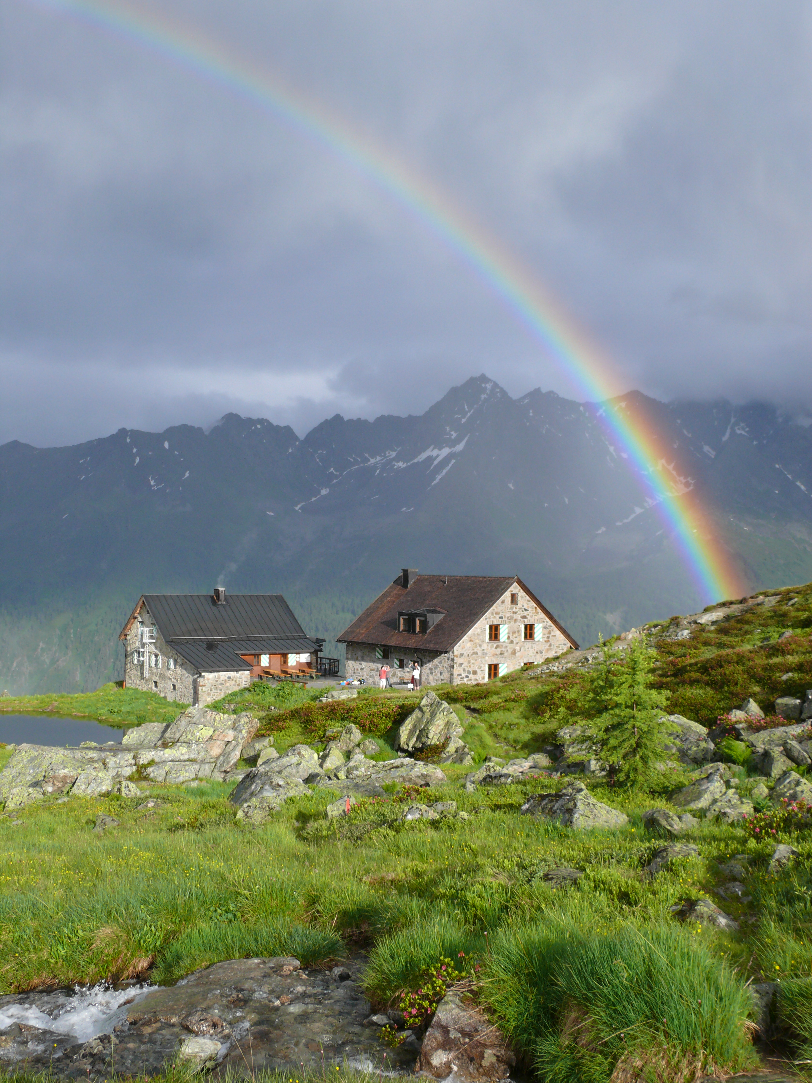 Verwall Tour